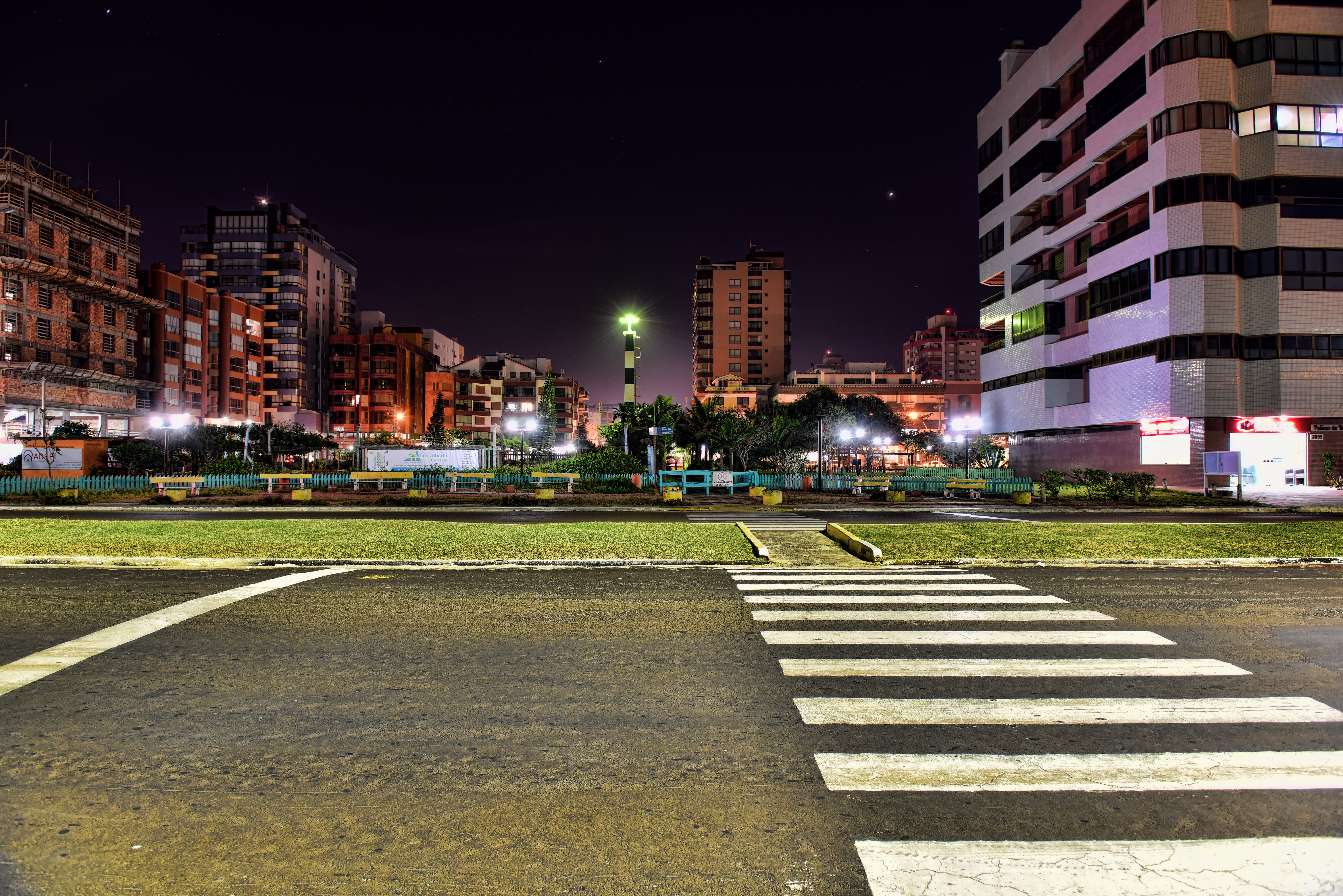 Foto tirada com uma nikon D810 Full frame com lente 24-70mm 2.8